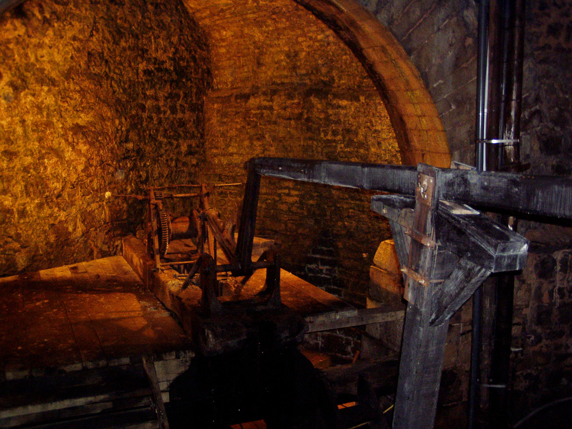 La pompe hydraulique de la saline de Salins-les-Bains dans le Jura (France)